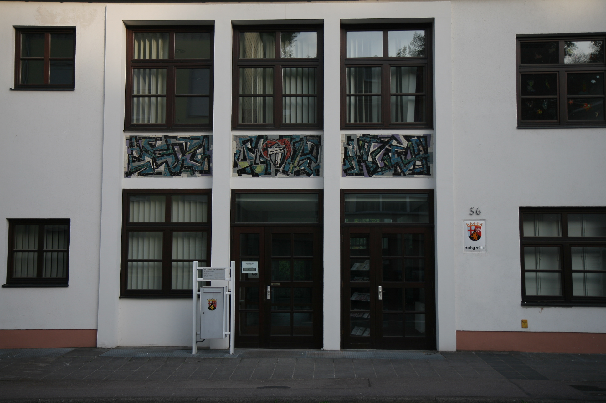 Gebäude des Amtsgerichts Saarburg in Saarburg.